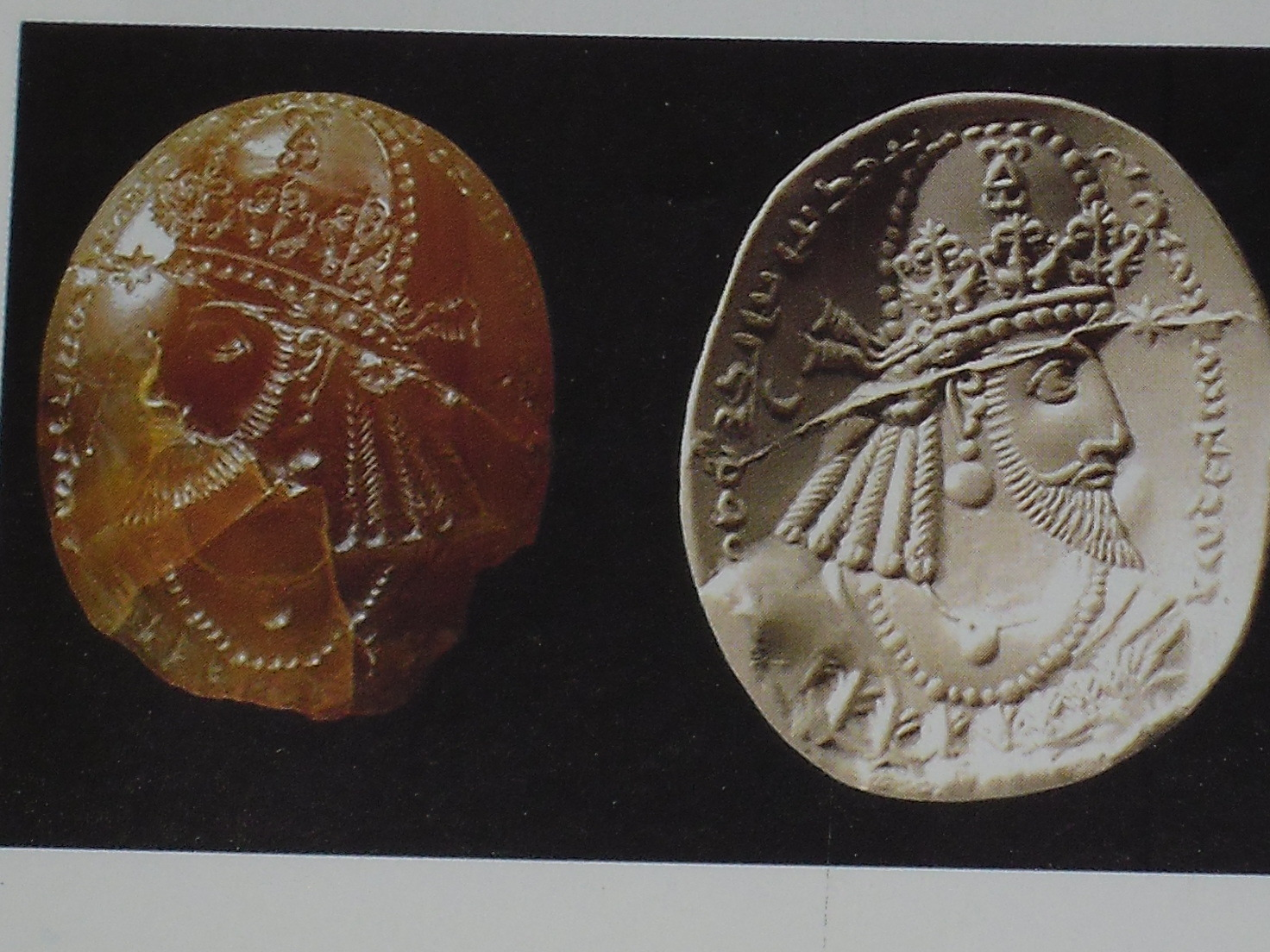 وه‌دین‌شاپور، ایران انبارَگ‌بد. در دوران یزدگرد دوم ۴۴۲ میلادی